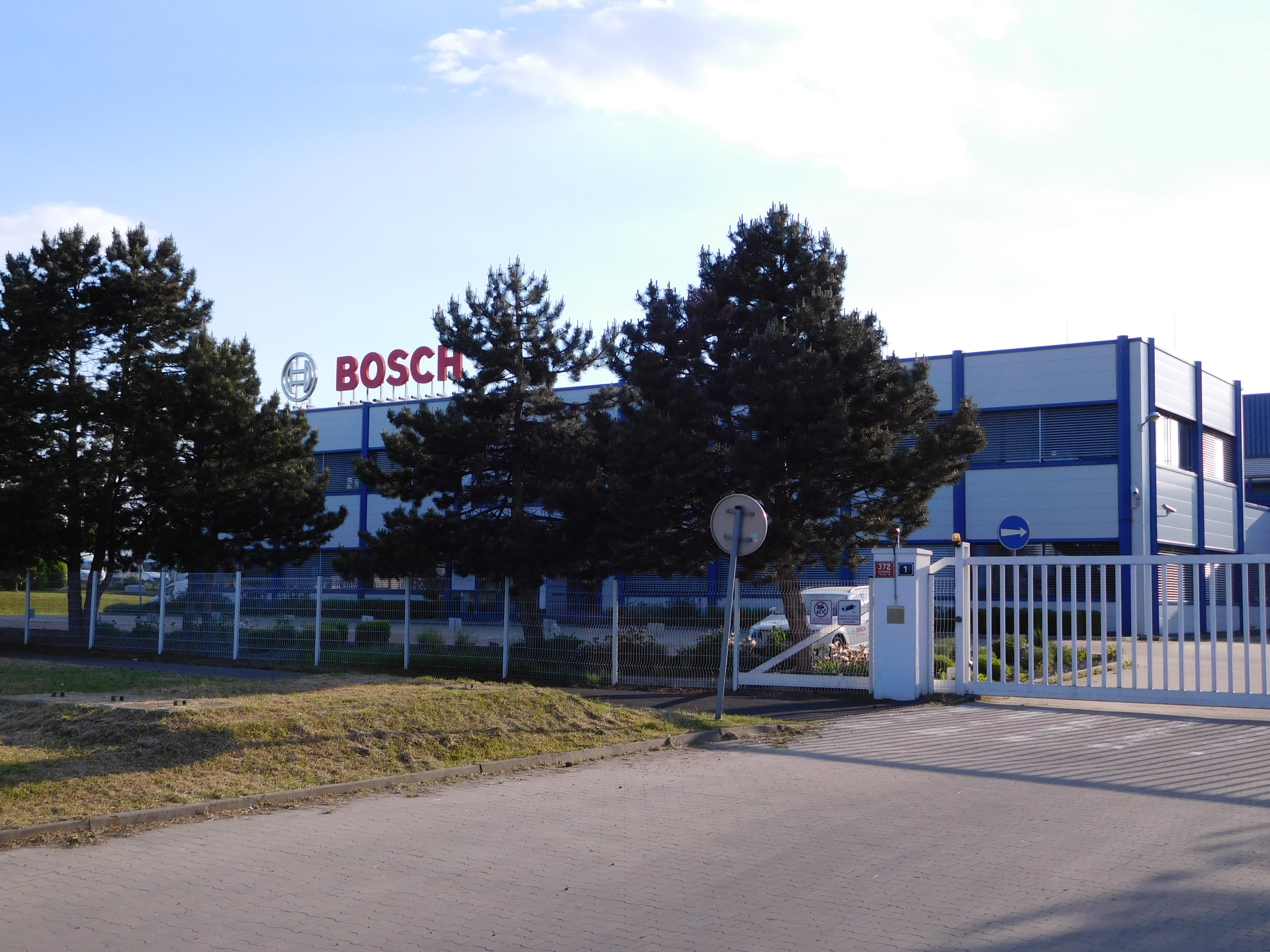 Praha - Štěrboholy, Průmyslová 1, Bosch Termotechnika